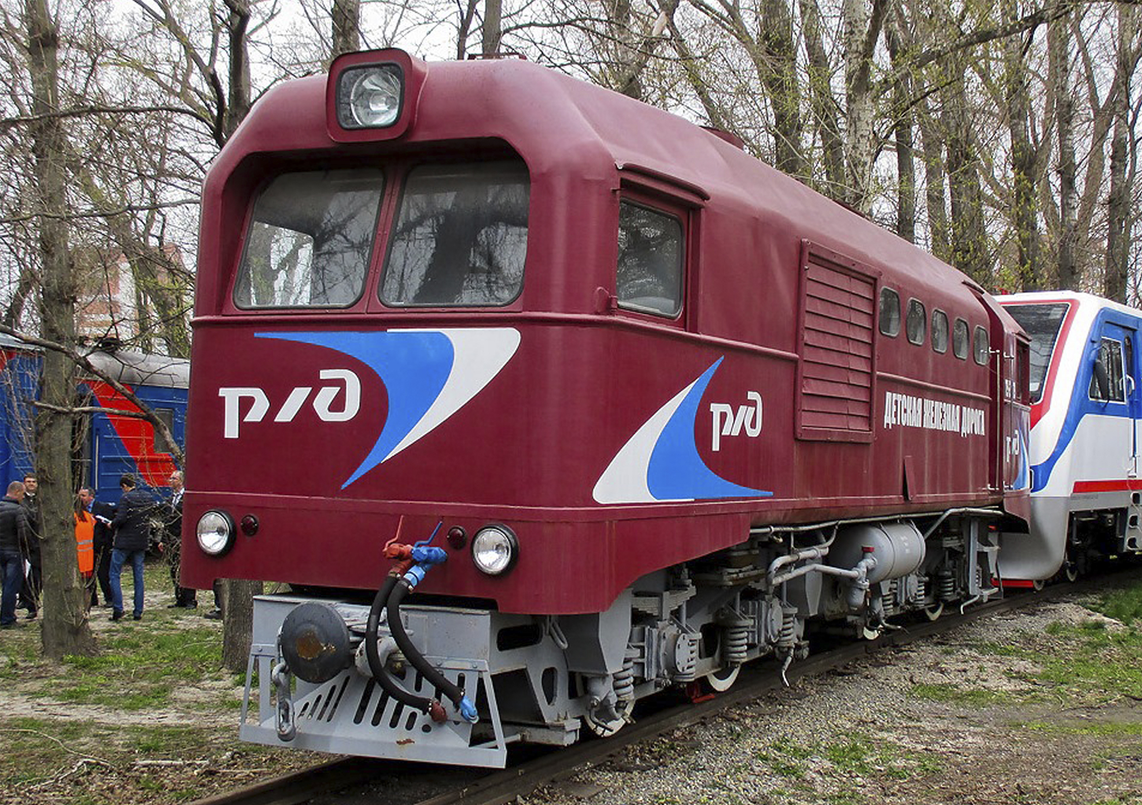 Построен в 1957 году Калужским машиностроительным заводом